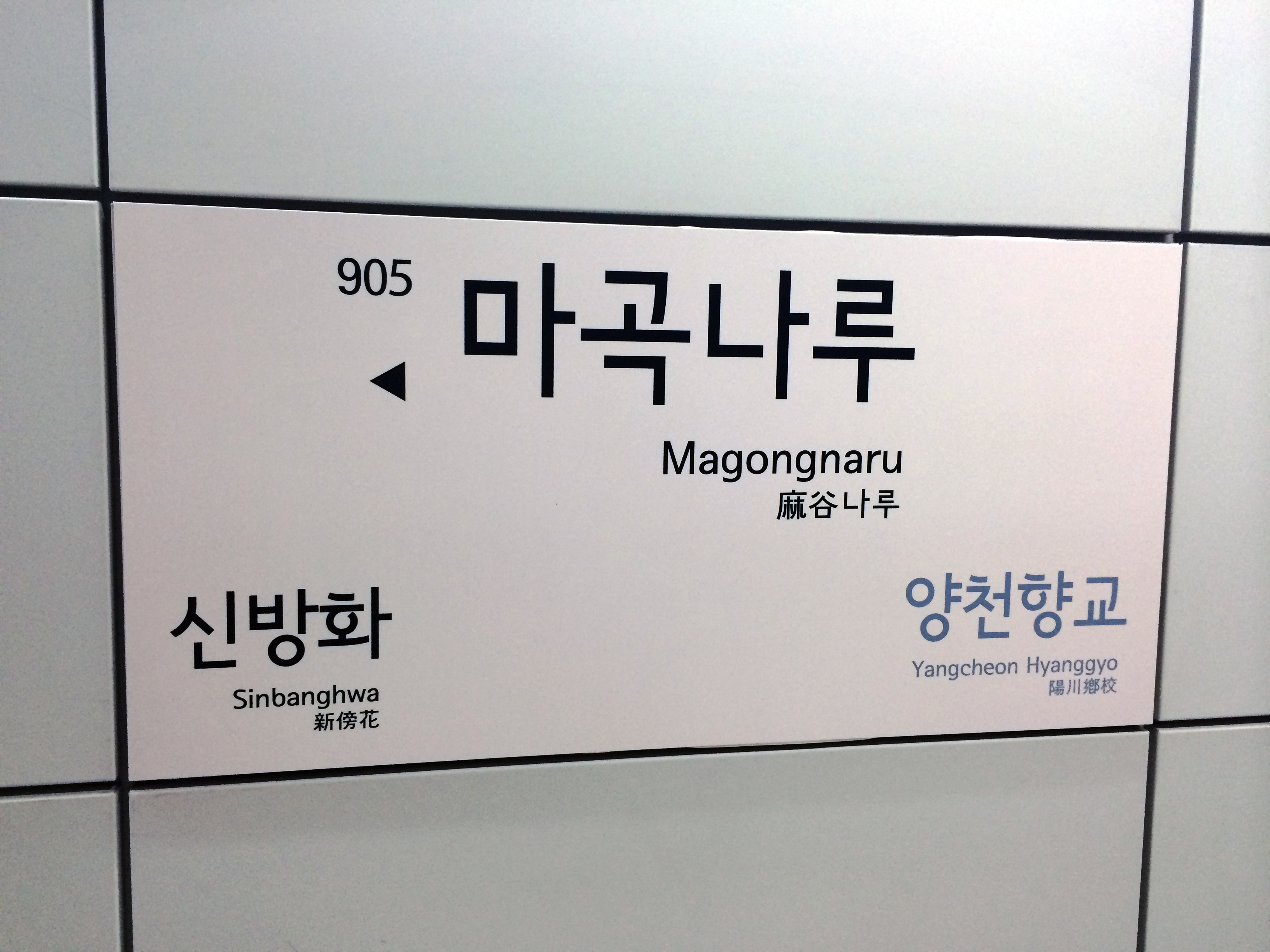 마곡나루역 역명판